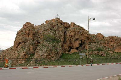 Azrou